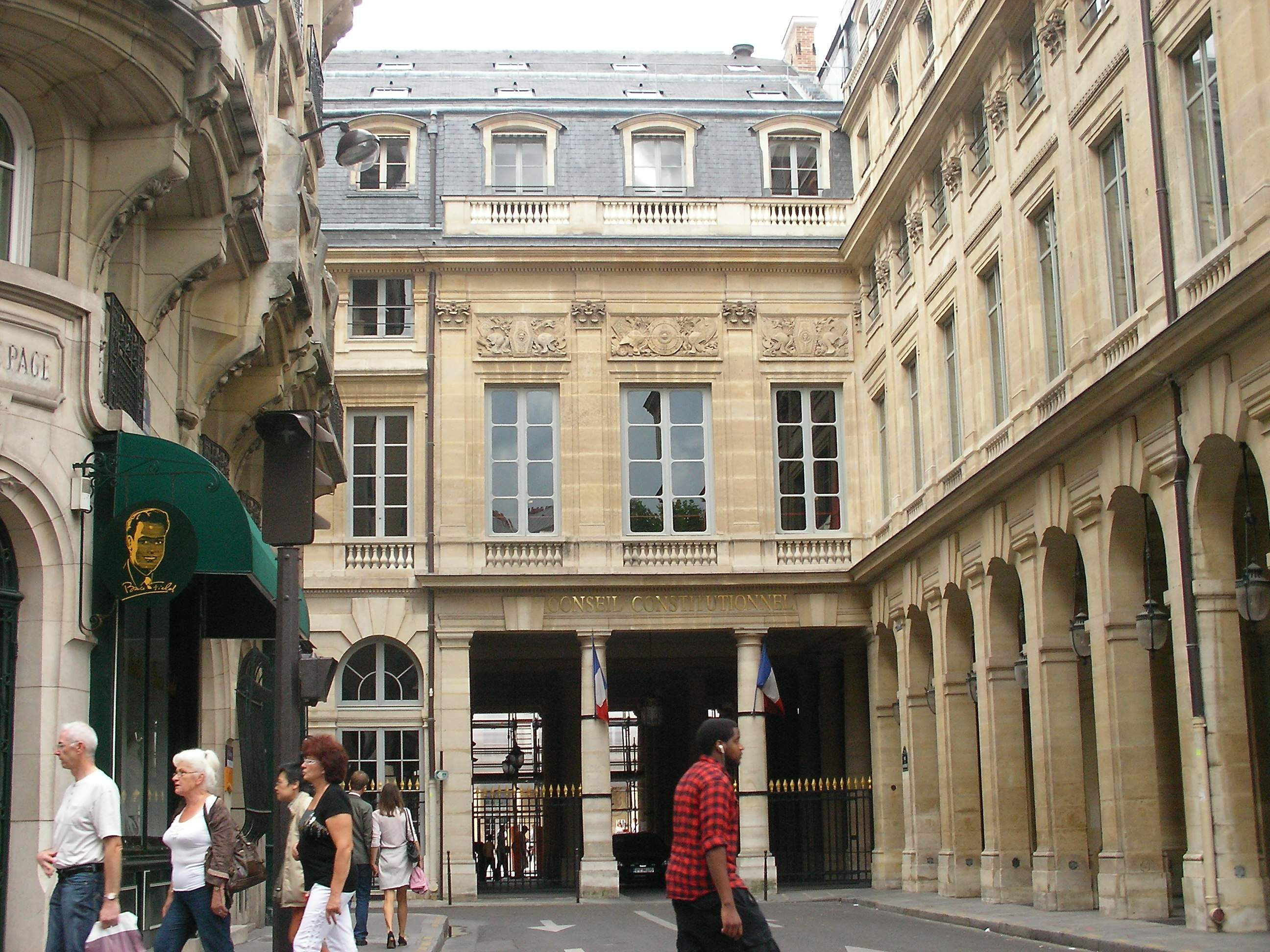 Conseil Constitutionnel à Paris (Île-de-France, France).